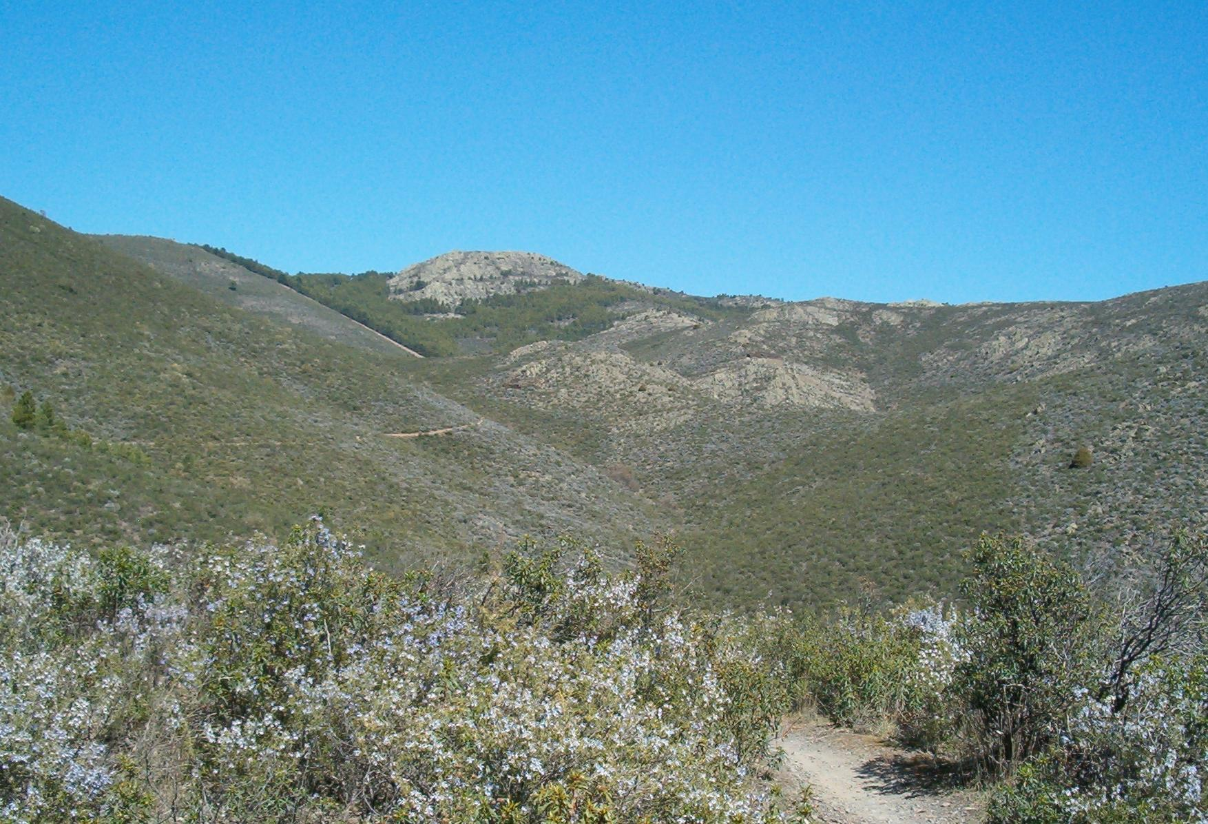 Vista del Cancho de la Cabeza (1264m) desde la vertiente sur.